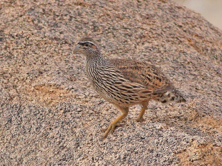 Windhoek to Omarara